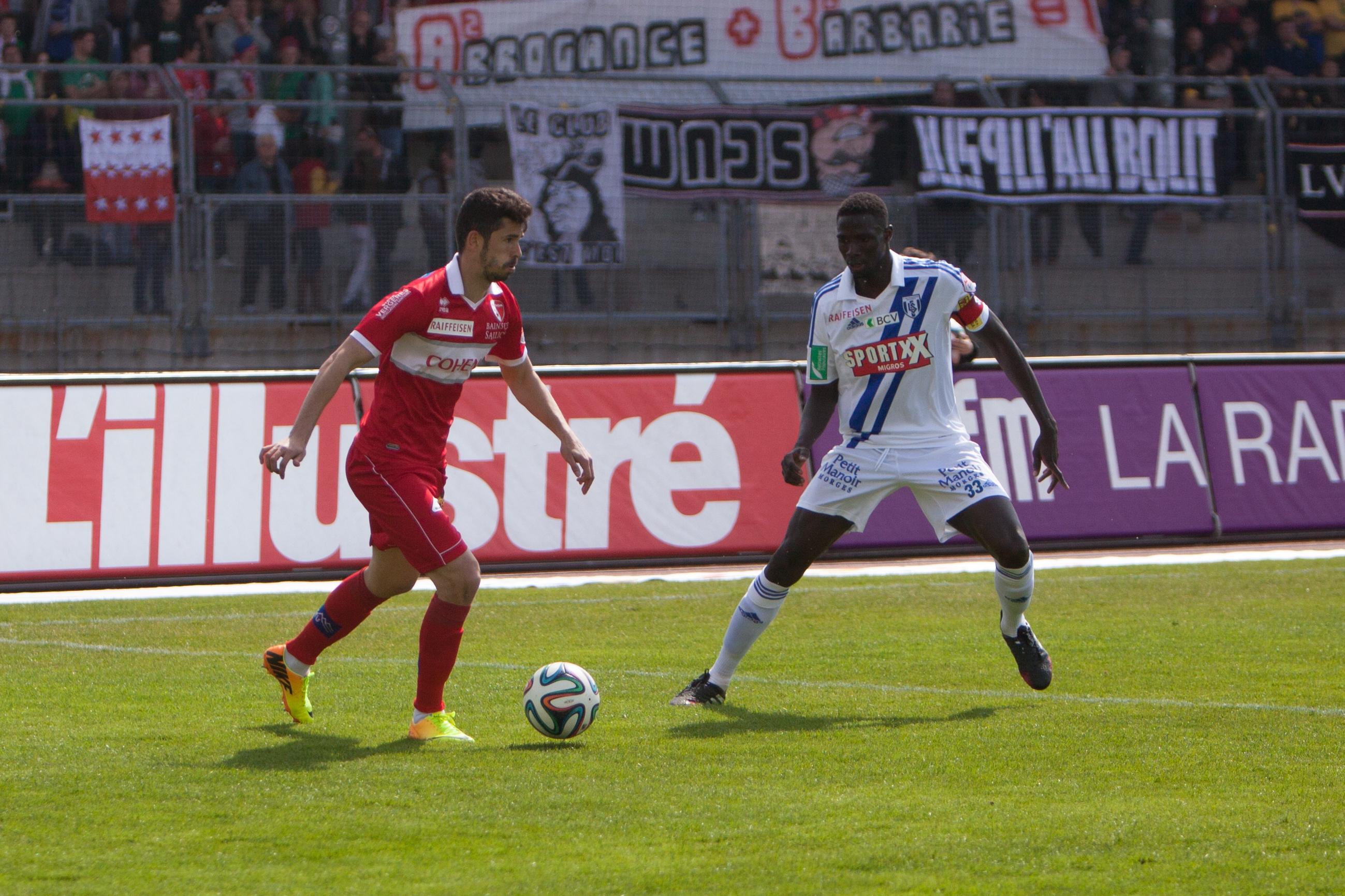 Lausanne Sport vs FC Sion - Avril 2014 - Ovidiu Herea & Yaya Banana